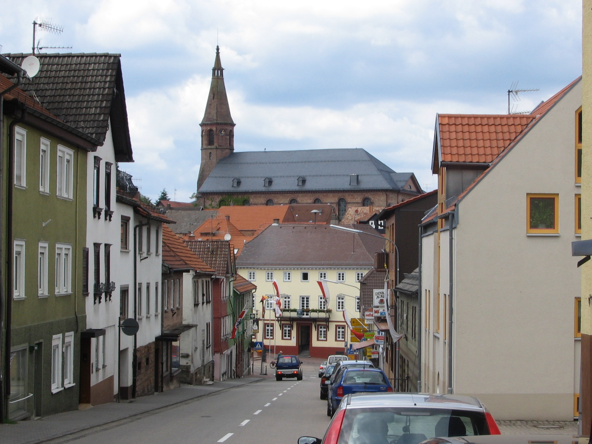 Blick durch die Gammelsbacher Straße zur Kreuzung Metzkeil auf das Rathaus von Beerfelden, darüber die evangelische Martinskirche.